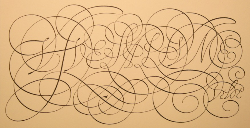 "Vive la plume" tracé et gravé par Jan van den Velde.